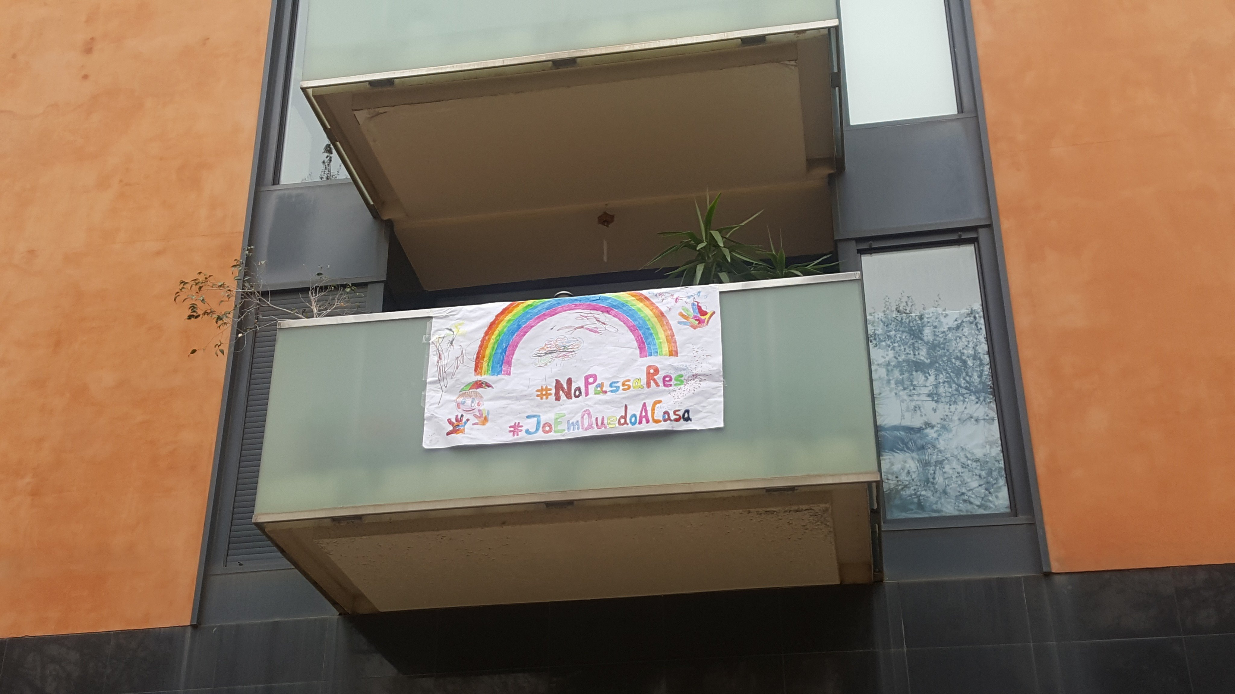 Balcó amb el lema #Joemquedoacasa